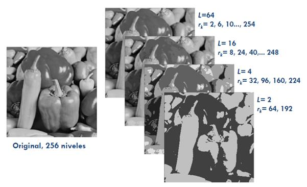 Imatge danyada per una mala quantificació, amb fals contorns